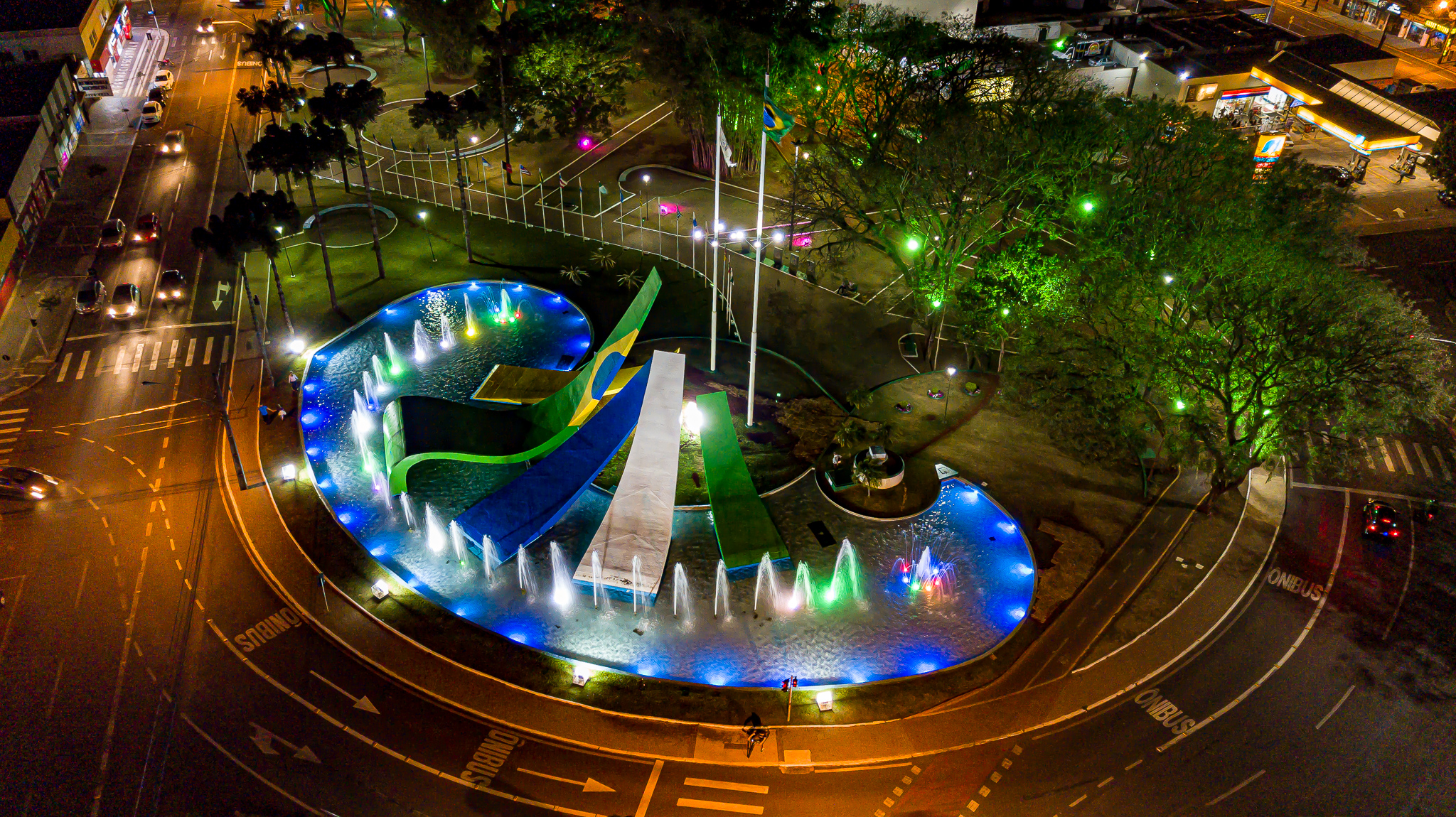 Foto da Praça do Migrante tirada a noite com Drone por Fabio Covaleski